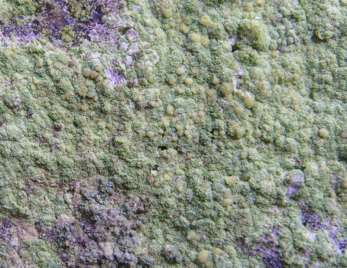 Psilolechia lucida, Koad Krenn - Pont Callec (Morbihan, Bretagne, France)